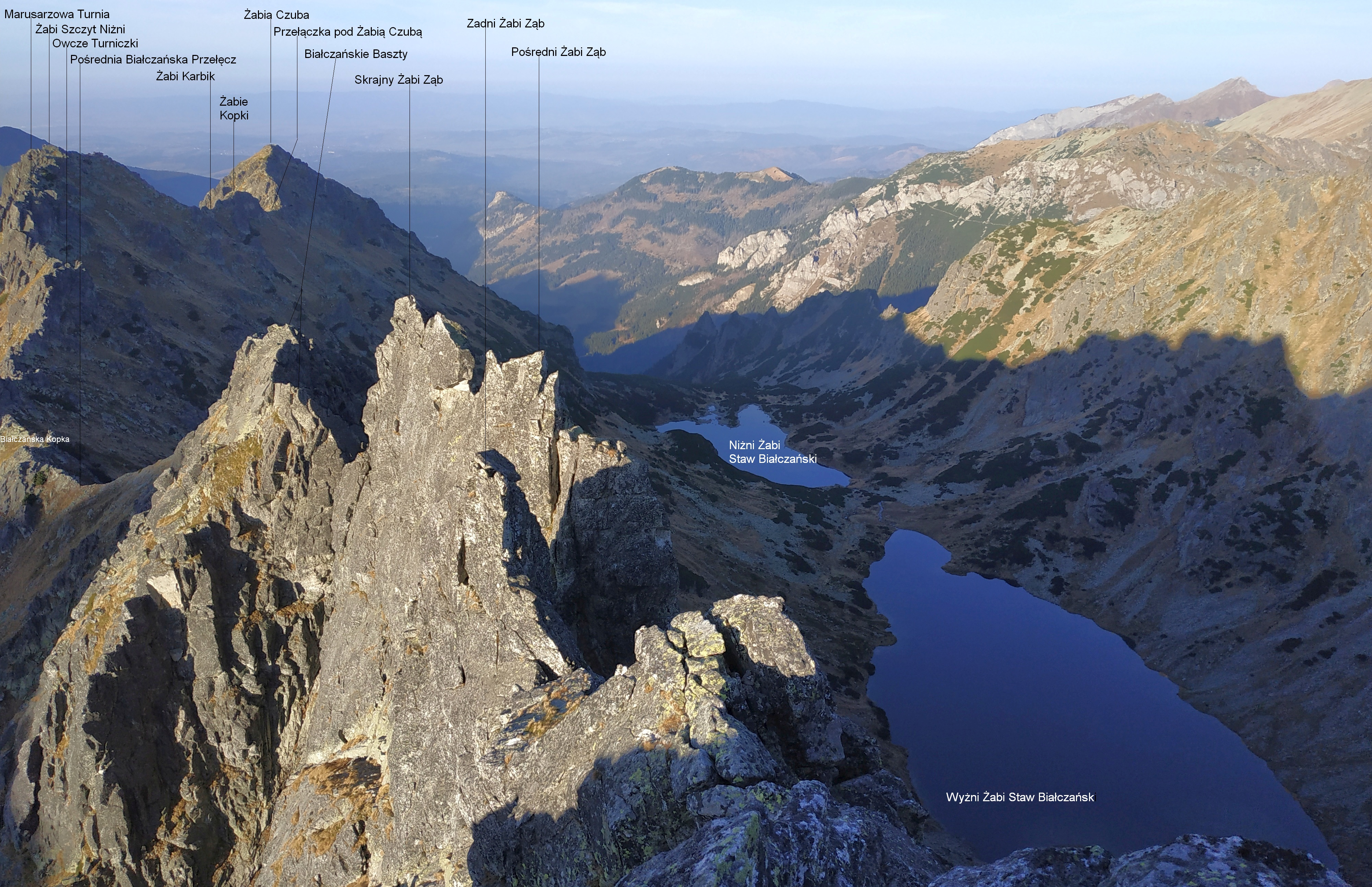 Widok Żabiego Szczytu Wyżniego